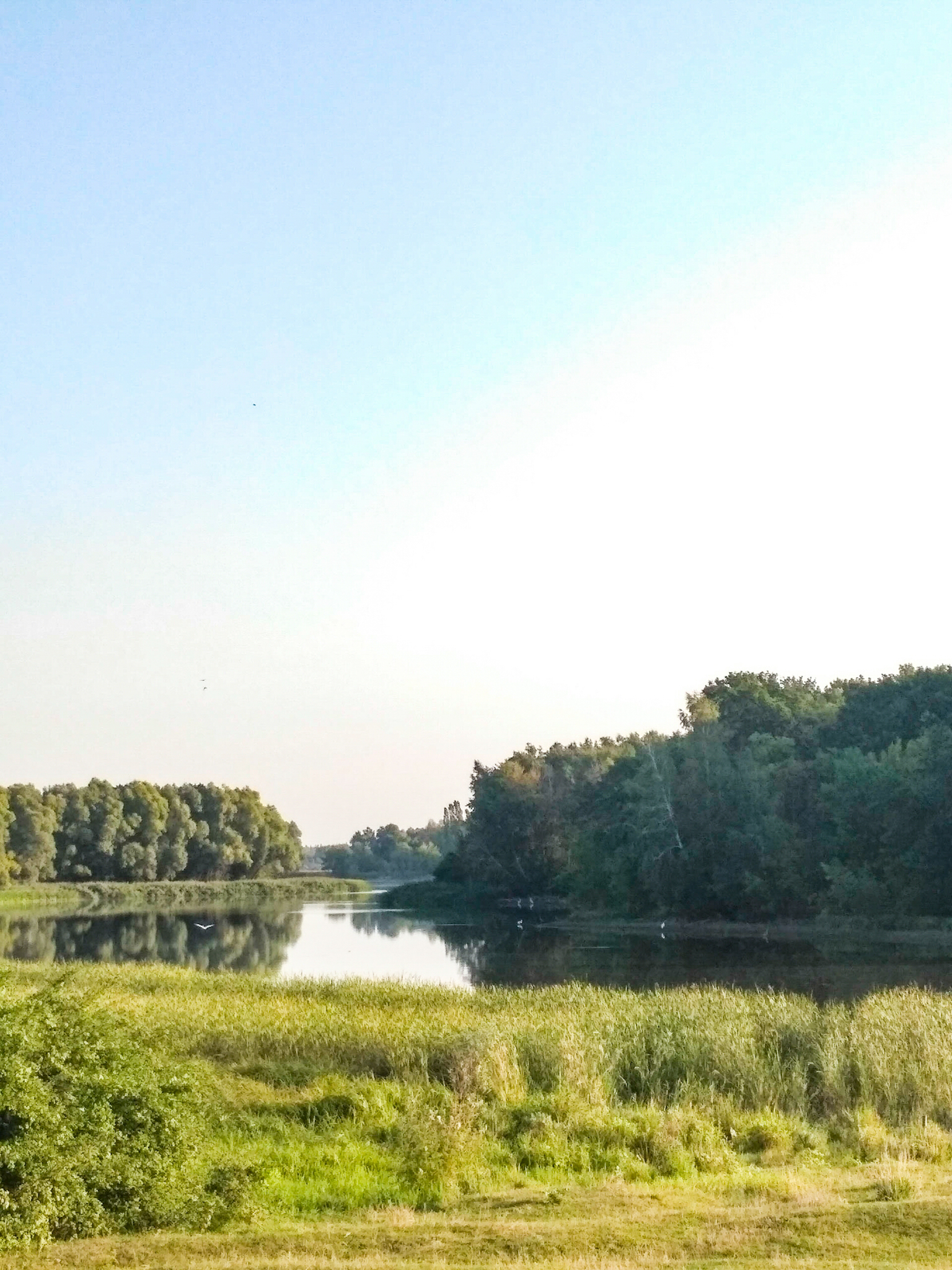 село Московський Бобрик. Ставок